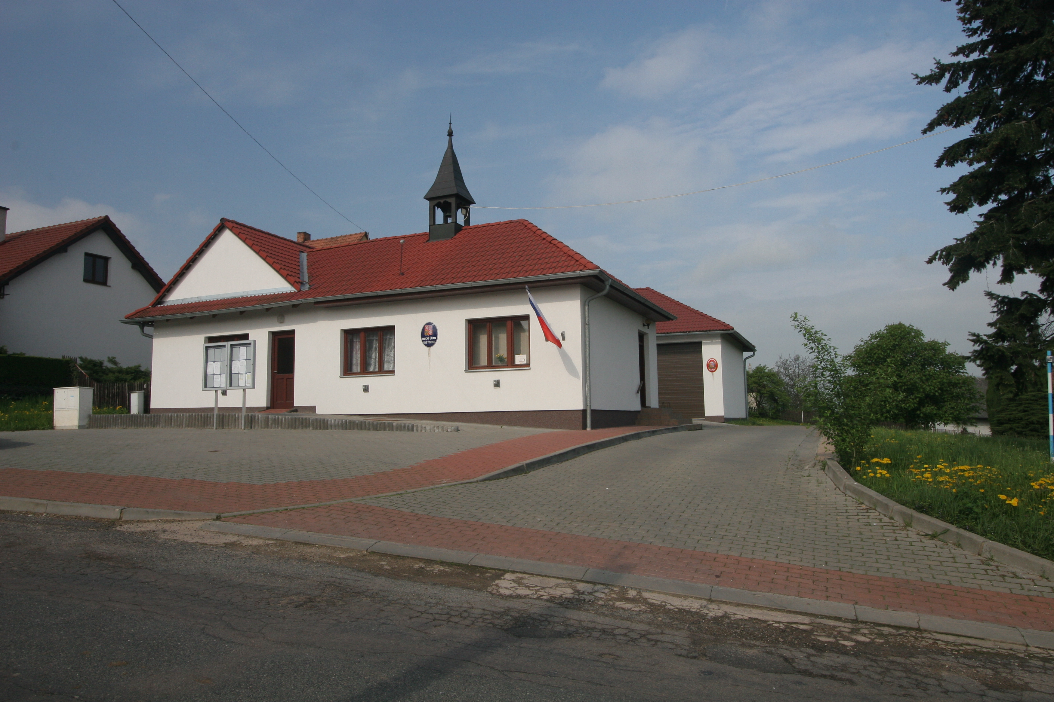 Malé Výkleky obecní úřad